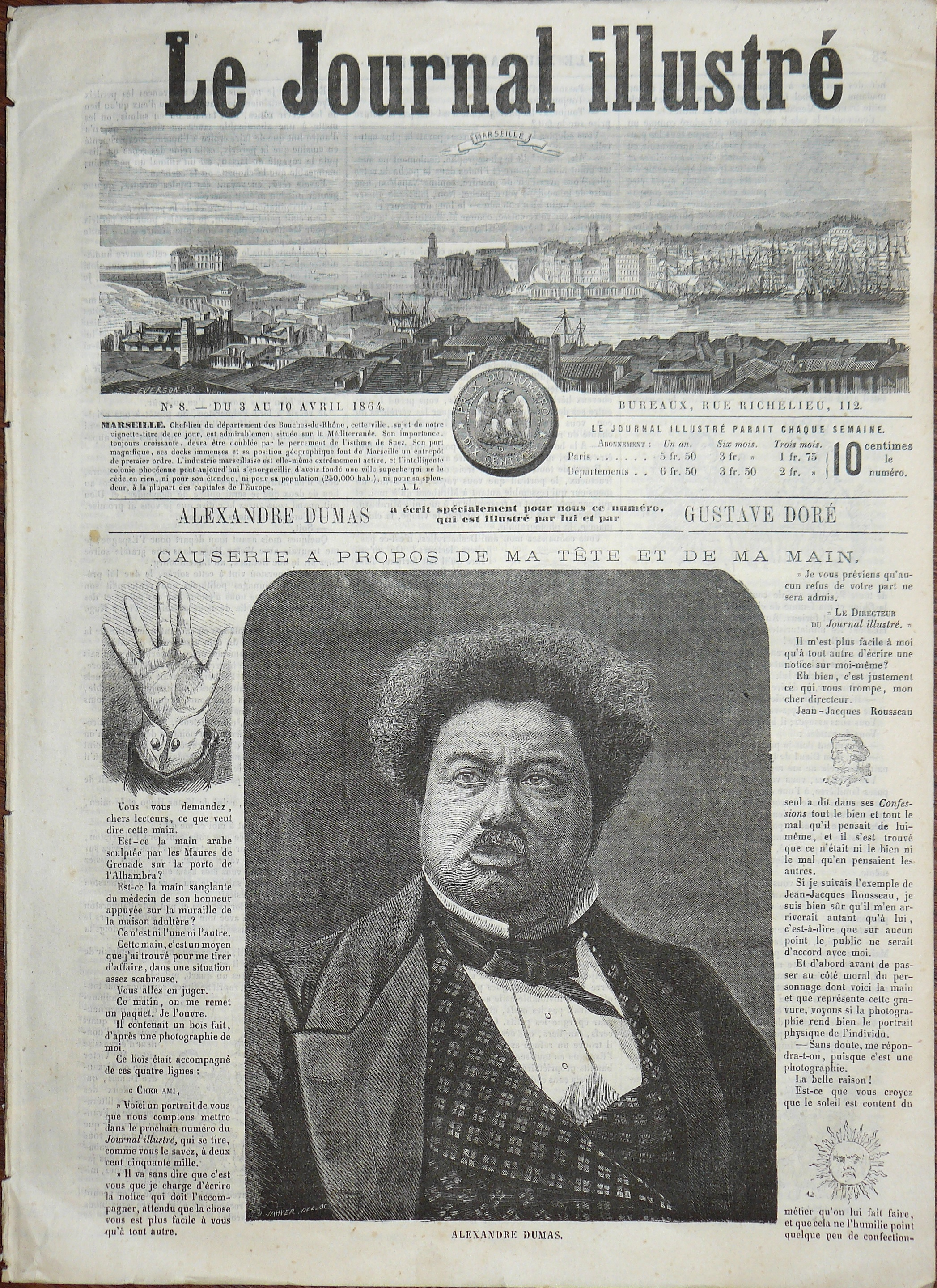 Le Journal illustré - hebdomadaire, N°8 du 3 avril 1864 - 27x37,5 cm, 8 pages. Article d'Alexandre Dumas. Gravures de Gustave Doré. Content: Article d'Alexandre Dumas décrivant sur 6 pages, après quelques anecdotes, une corrida à laquelle il a assisté à Madrid, en compagnie de son fils, de Giraud, Desbarrolles (Gastibilza, l'homme à la carabine), Boulanger, Maquet, Amedée Achard et Théophile Gautier. Le récit est agrémenté de petits croquis de sa main et de deux grandes gravures de Gustave Doré. Portrait de Dumas d'après une photo de Nadar en première page.